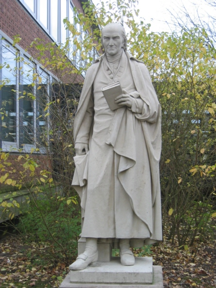 Statue von Bernhard Heinrich Overberg am Overberg-Kolleg in Münster. Selbst fotografiert von Werner B. Sendker.